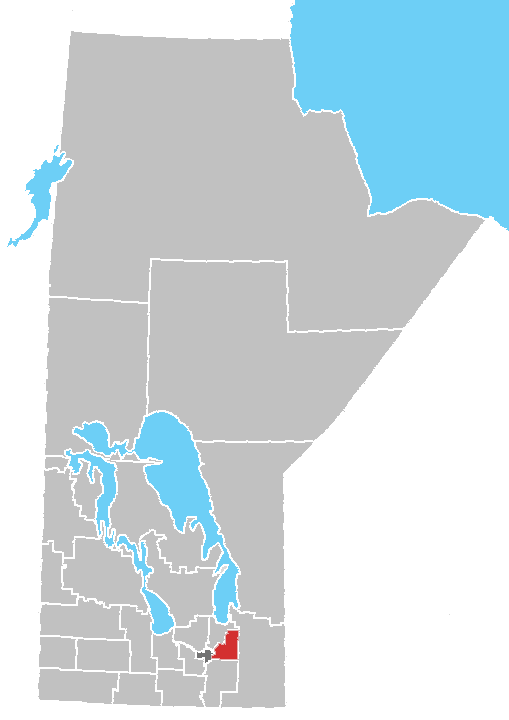 Manitoba census area No. 12